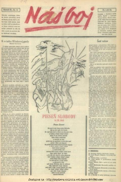 Titulný list periodika Náš boj